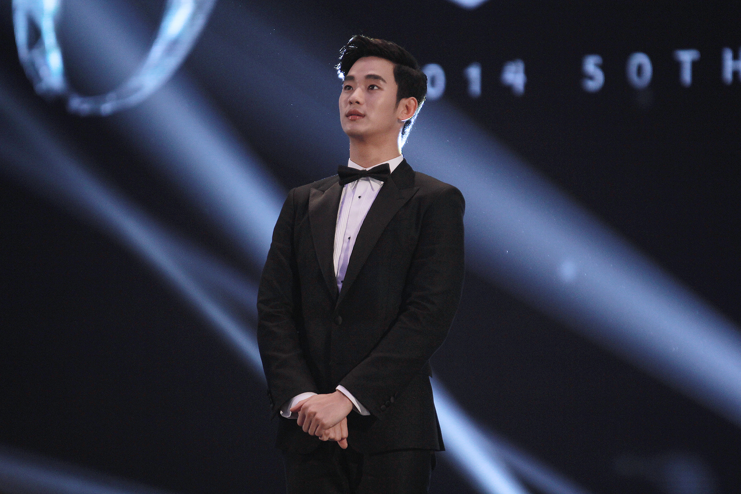 2014 백상예술대상.